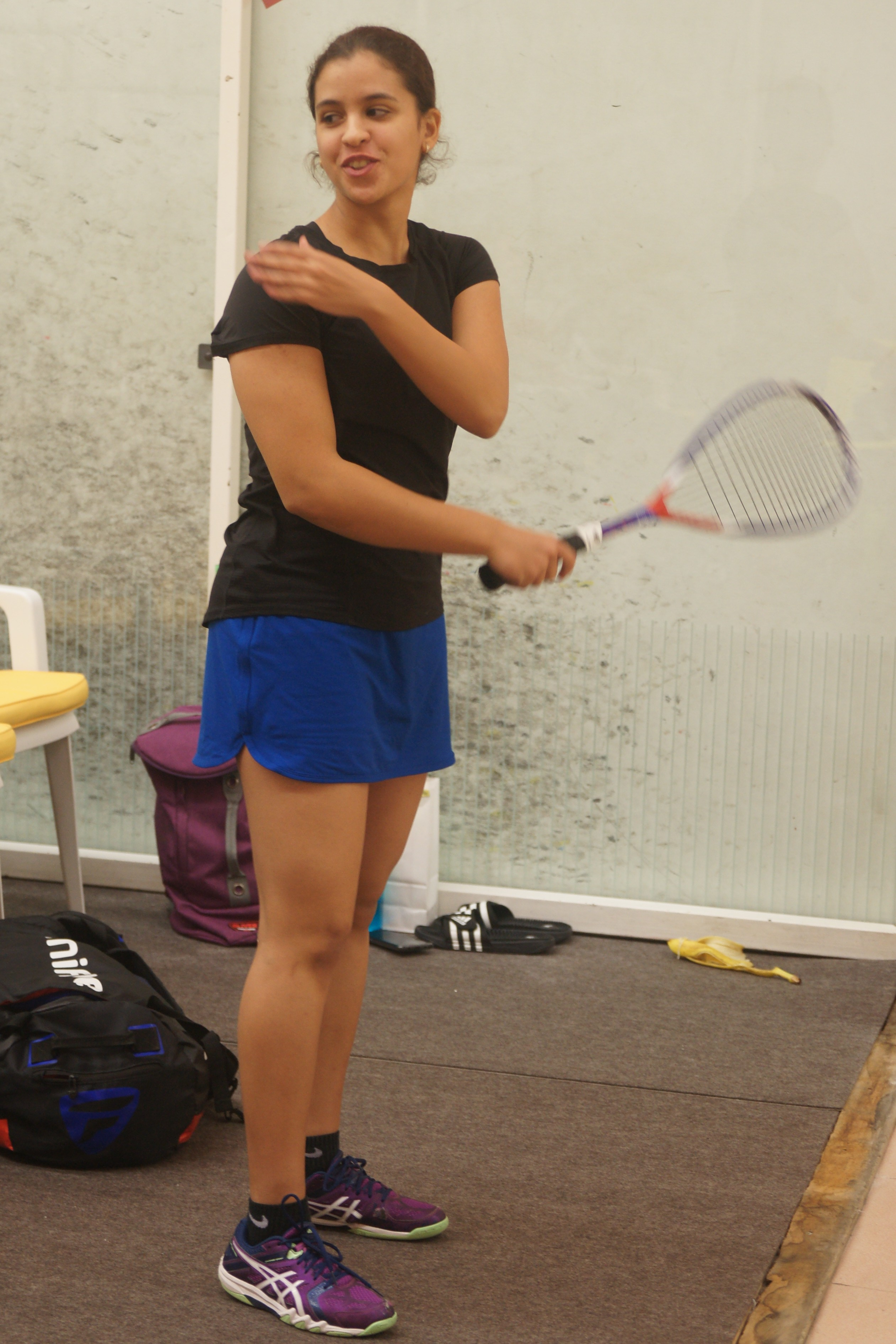 Menna Hamed, Monaco Squash classic 2018